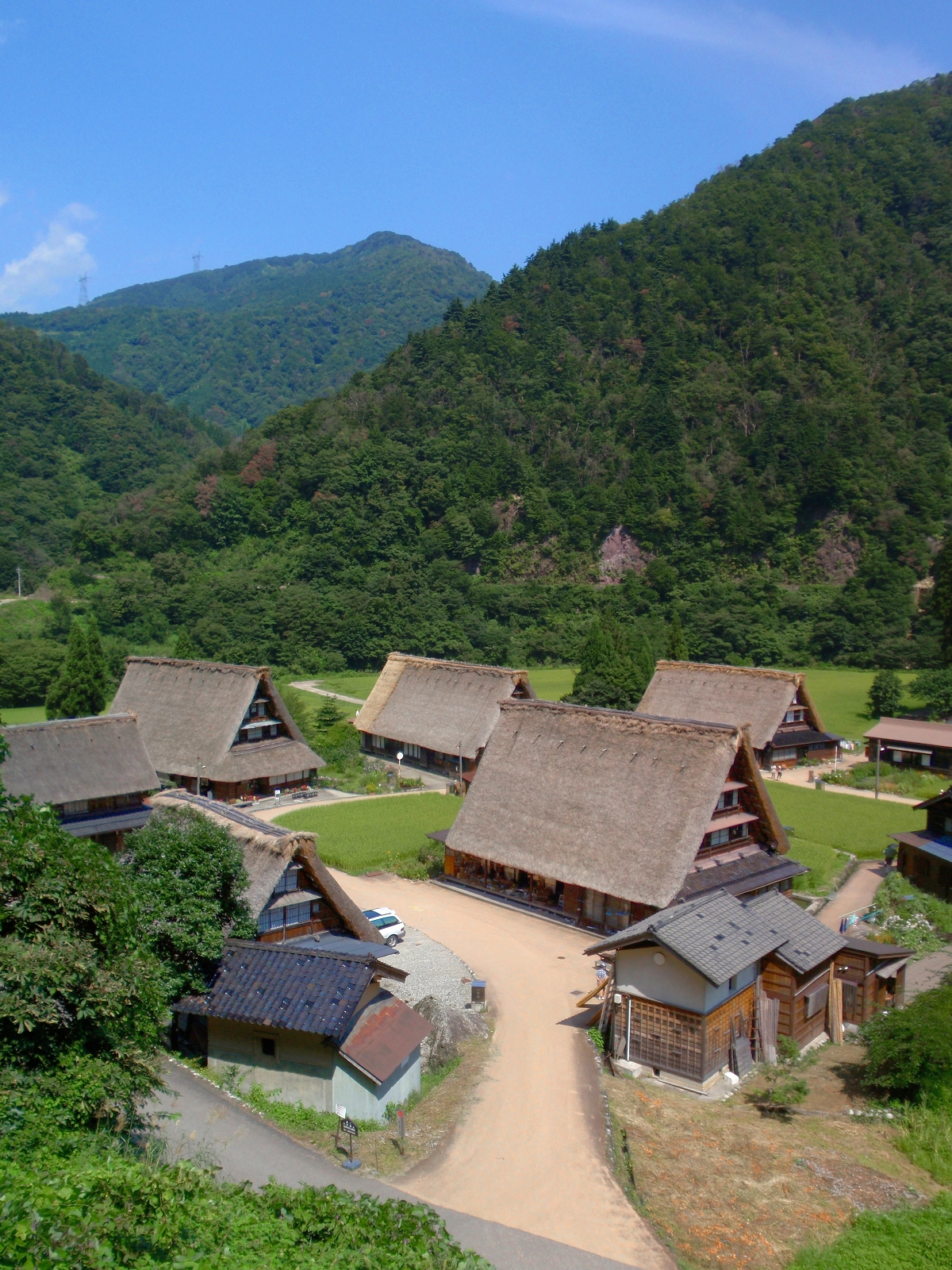 富山県南砺市菅沼、越中五箇山菅沼集落